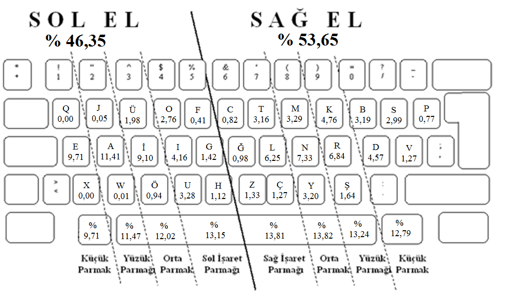 E klavye dağılım